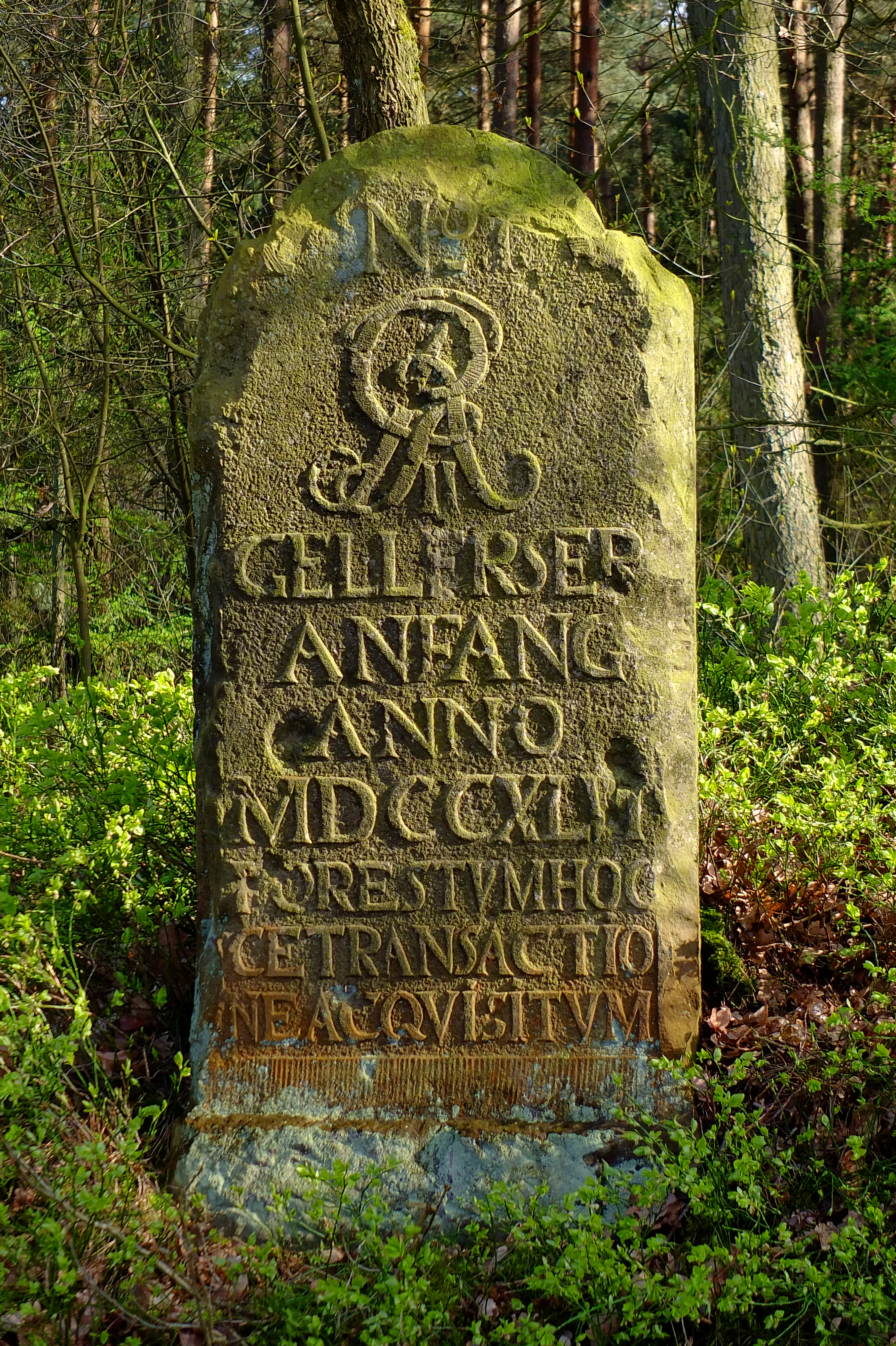 Historischer Grenzstein aus Buntsandstein am nördlichen Rand des Waldgebietes Gellerser Anfang (Verwaltung heute: Klosterrevierförsterei Garlstorfer Wald) am Weg von Kirchgellersen nach Putensen auf dem Gebiet der Gemeinde Westergellersen in der Samtgemeinde Gellersen (Niedersachsen, Landkreis Lüneburg): der sogenannte Georg-Rex-Stein zur Kennzeichnung der Grenze zwischen herrschaftlichem Wald und Bauernwald im 18. Jahrhundert. Maße: 170 cm hoch, 63 cm breit. Die Nummerierung oben (römische I) kennzeichnet den Stein als ersten von 31 bzw. - je nach Quellle - 32 Steinen, die das Waldgebiet in seiner damaligen Grenze einfasst. Darunter befindet sich das Monogramm von Georg II. (König von Großbritannien und Irland, deutscher Kurfürst von Braunschweig-Lüneburg (Hannover) von 1727 bis zu seinem Tode am 25. Oktober 1760), in dessen Namen der Stein gesetzt wurde. Die Inschrift lautet: „GELLERSER ANFANG“ - „ANNO MDCCXLVI“ (1746) - „FORESTUM HOCCE TRANSACTIONE ACQUISITUM“ und verweist auf das Jahr, in dem der Rezess über diese Grenze unterzeichnet wurde. Der Stein ist als „Denkst.“ verzeichnet auf der Karte unter: Historische Grenzsteine stehen als Kulturdenkmale (Bau- und Kunstdenkmale) unter Denkmalschutz.